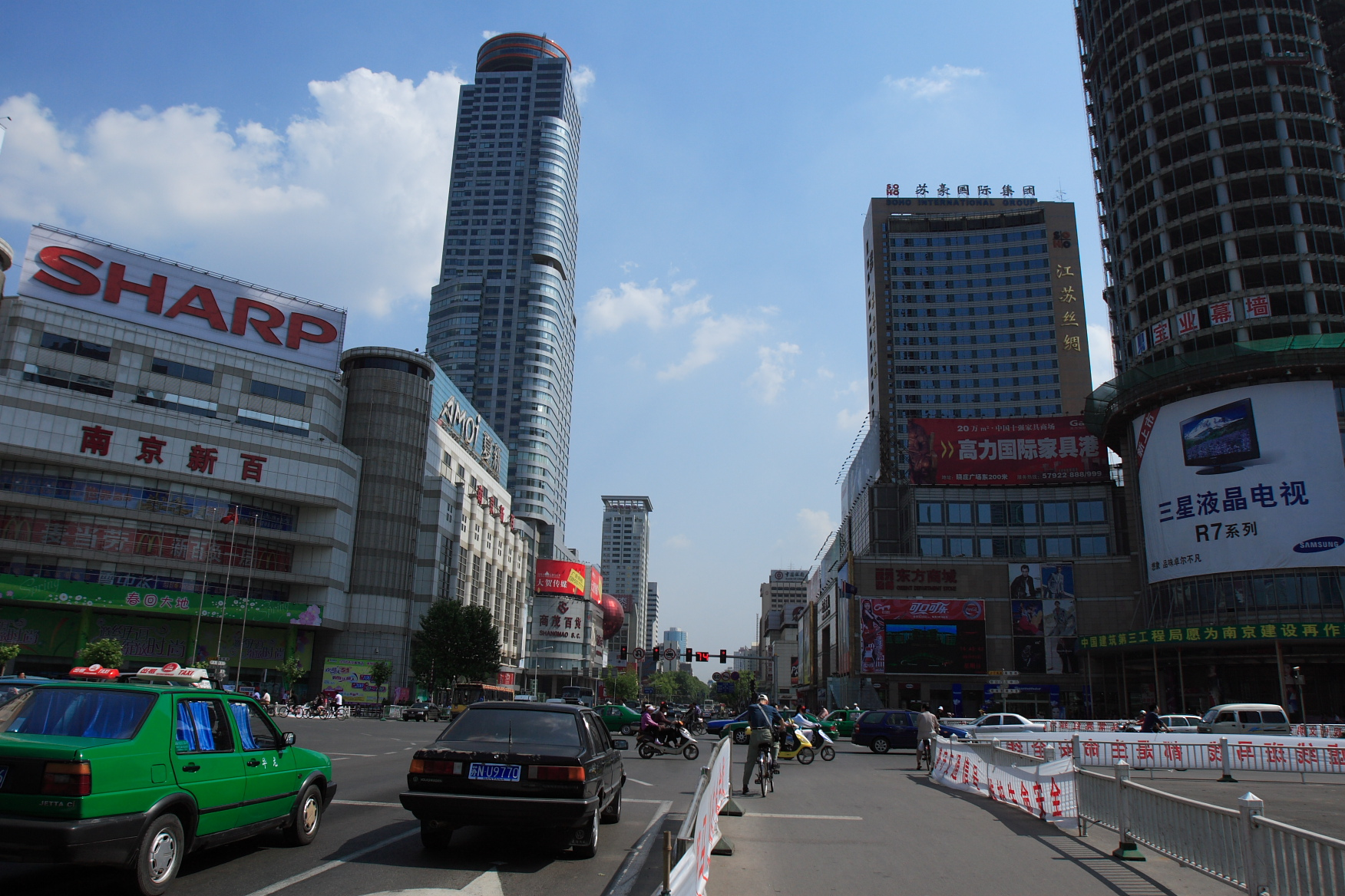 南京新街口